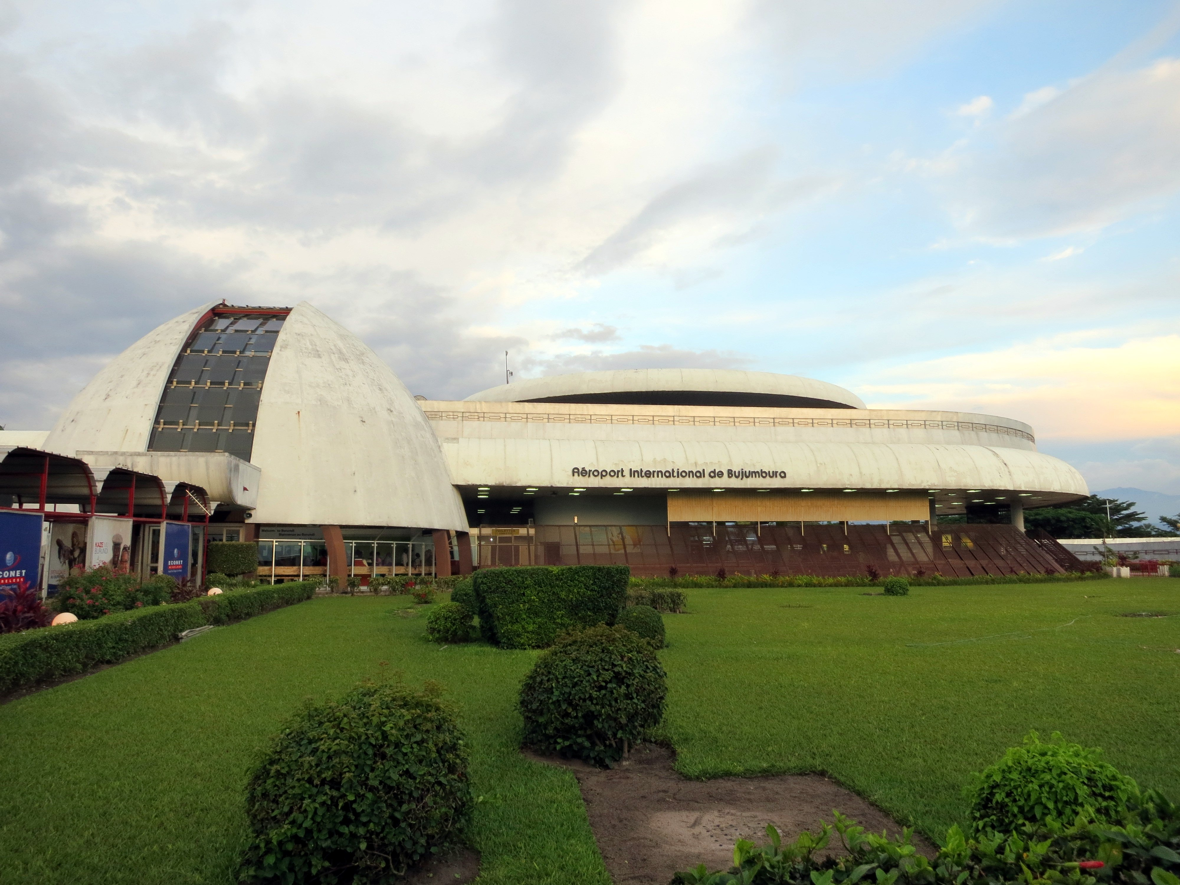 Bujumbura International Airport, Burundi